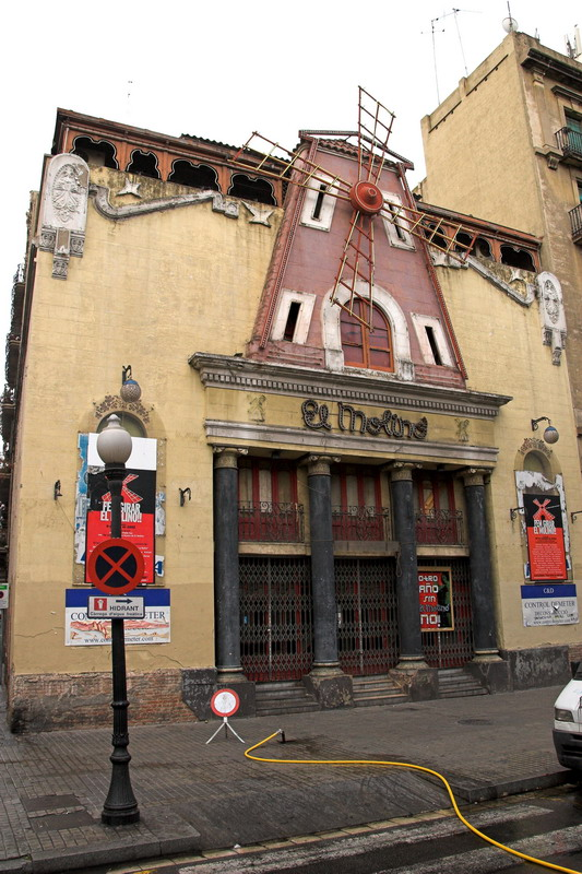 El Molino. Teatre-Cabaret (Barcelona-Catalunya), 1915. Joaquim Raspall